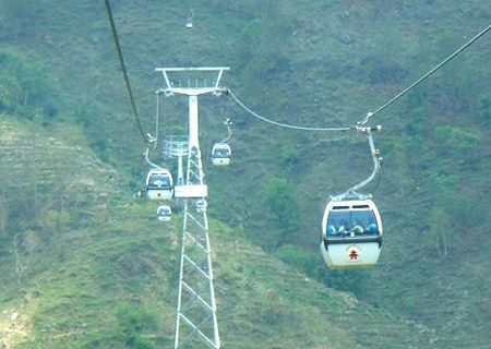 नेपाली: nepal cureen tar